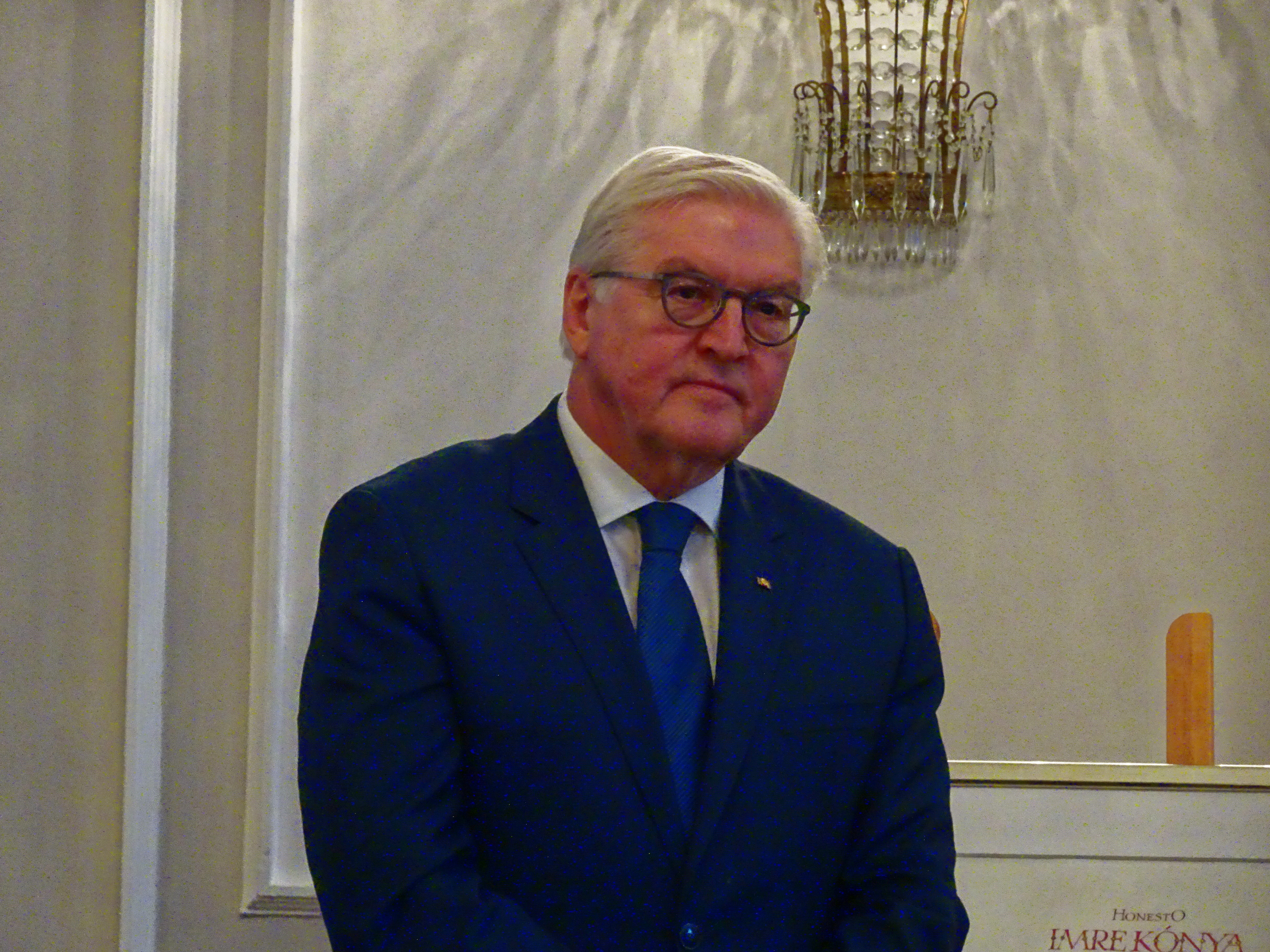 Bundespräsident Steinmeier anläßlich der Adalbert-Preis Übergabe 2017